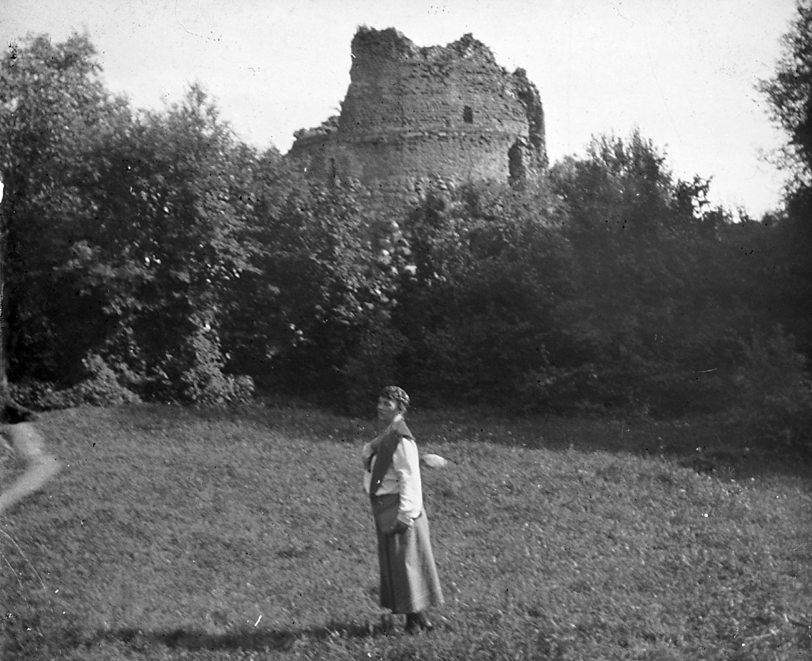 Ruiny zamku w Trokach w latach 30 XX wieku.